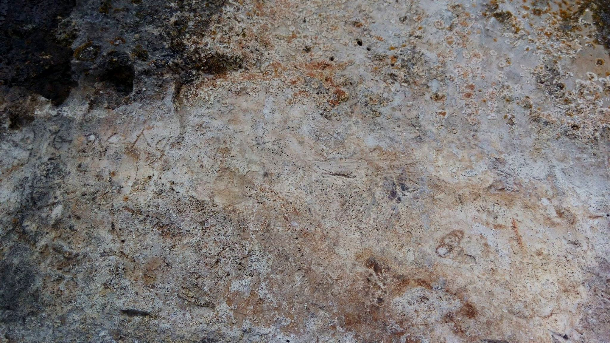 Kripta u selu Rataji kod Miljevine (Foča) - arheološko područje Rataje.